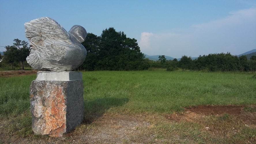 Petar Hranuelli, LOVINAC park skulptura, 2016., lički kamen